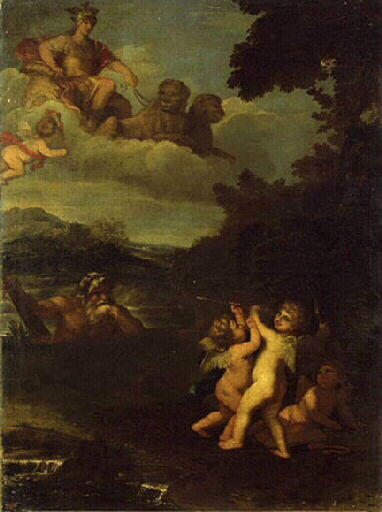 Bellonalabel QS:Len,"Bellona" label QS:Lfr,"Bellone"